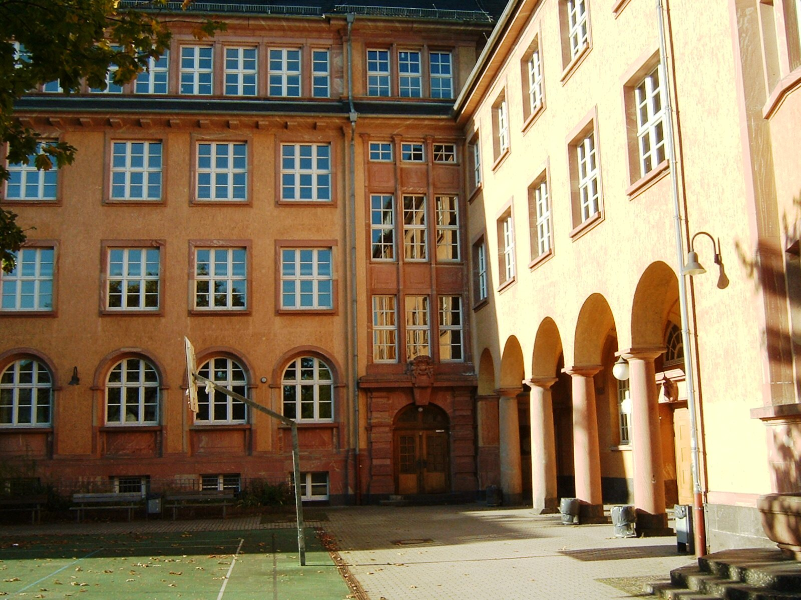 Max-Beckmann-Schule in Frankfurt-Bockenheim, Eingang Georg-Speyerstraße